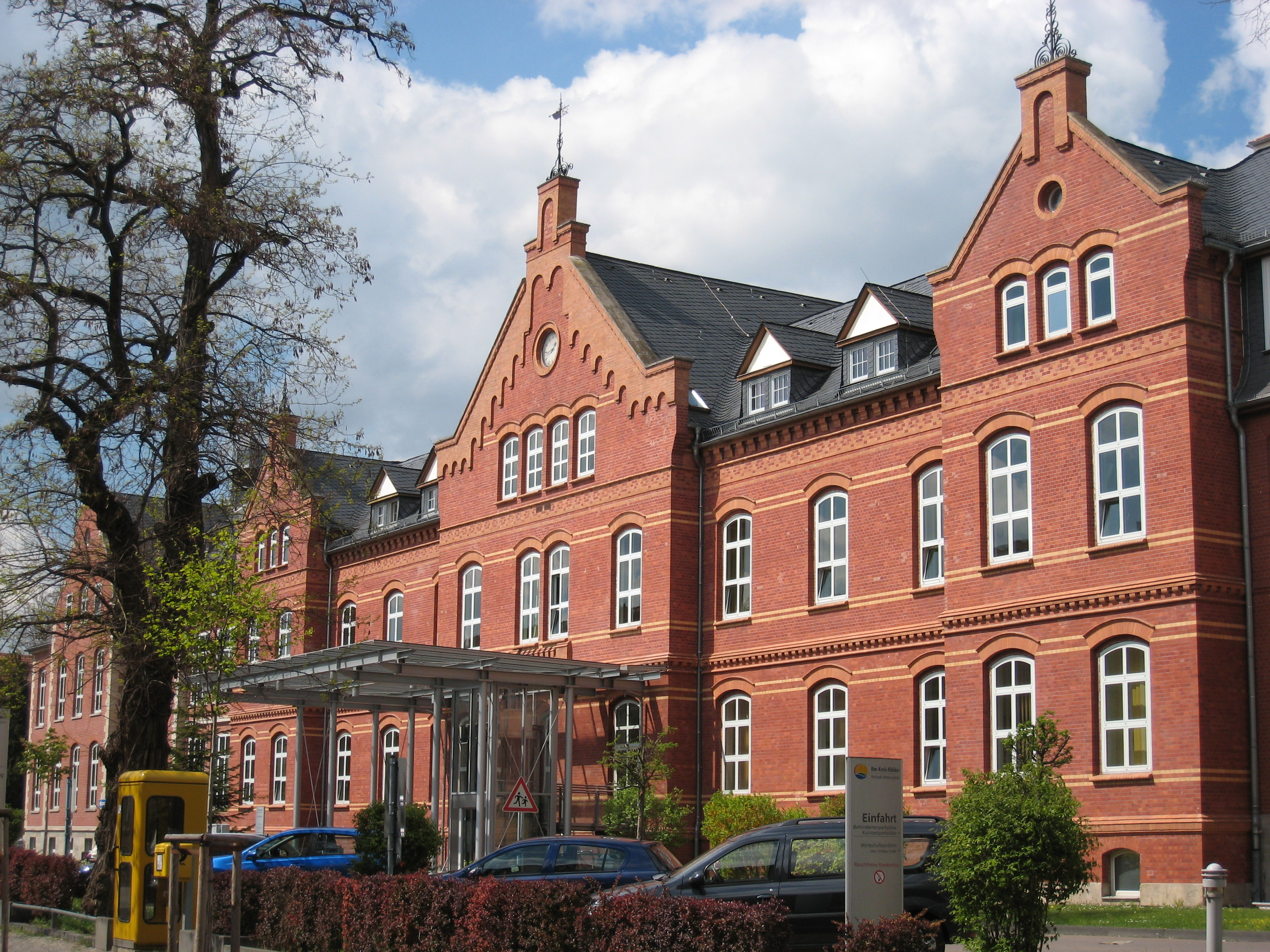 Das Krankenhaus in Arnstadt (Ilmkreis-Kliniken), Bärwinkelstraße.